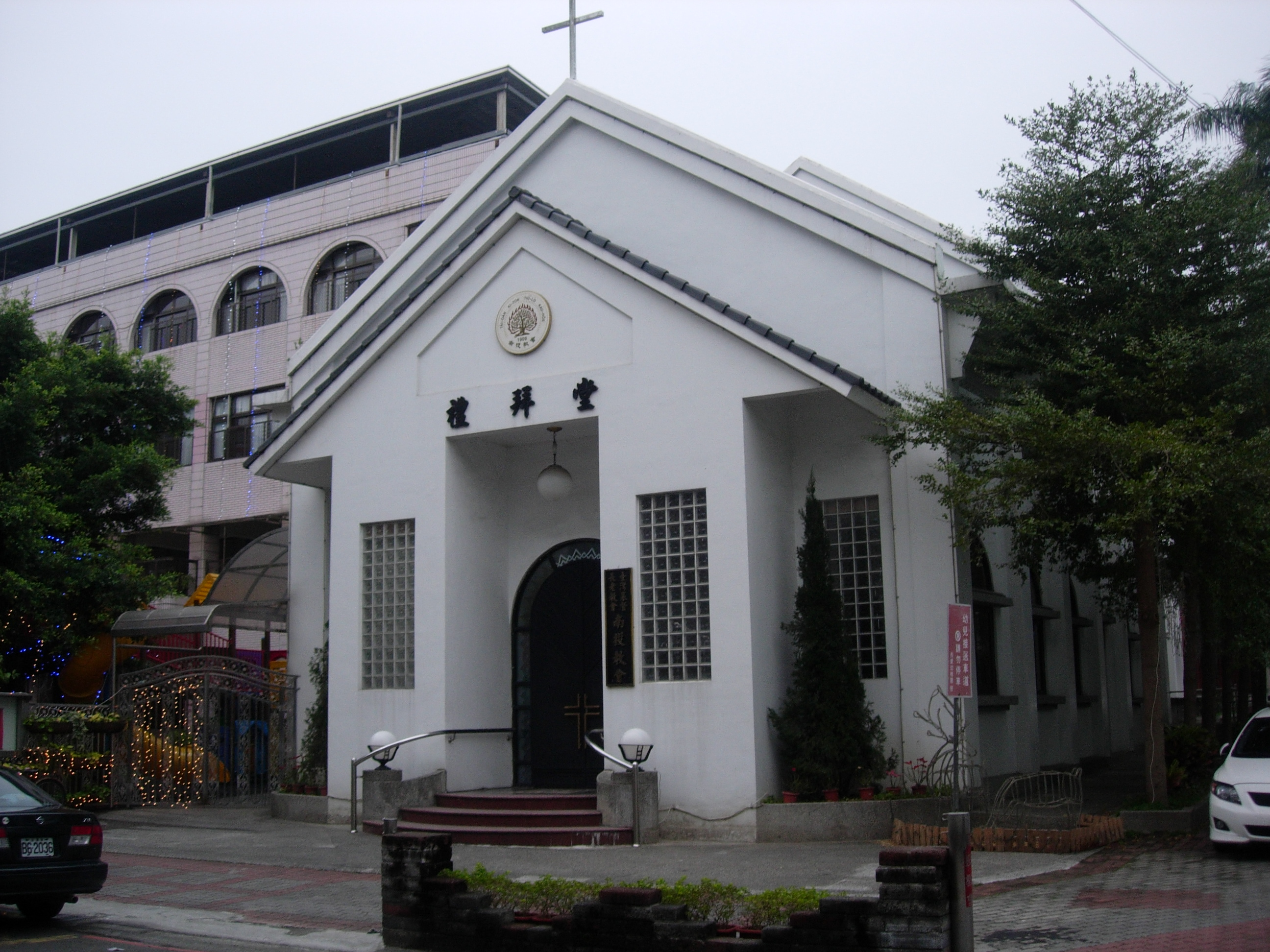 中文（台灣）: 台灣基督長老教會南投教會。